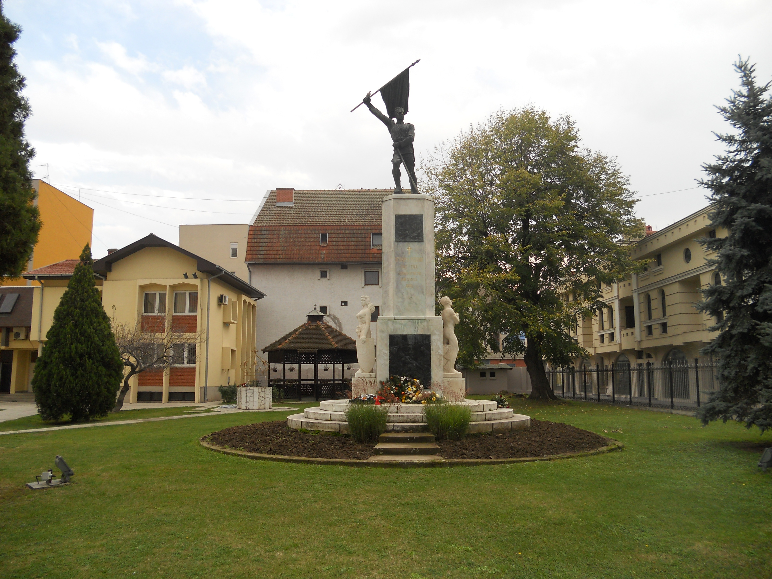 аутор Дарко Гајић